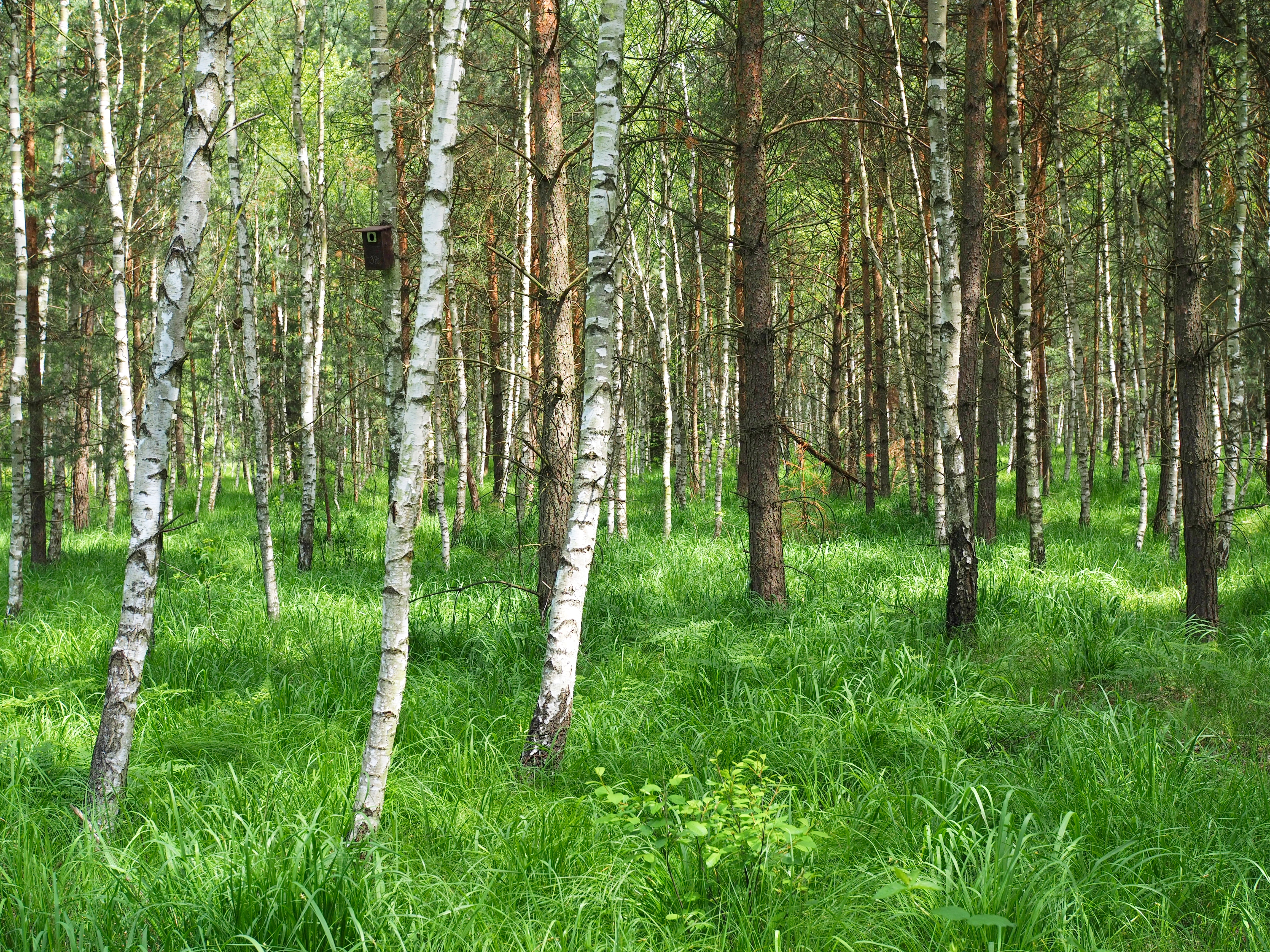 Evropsky významná lokalita Běleč - střelnice (Special Area of Conservation Běleč - střelnice)